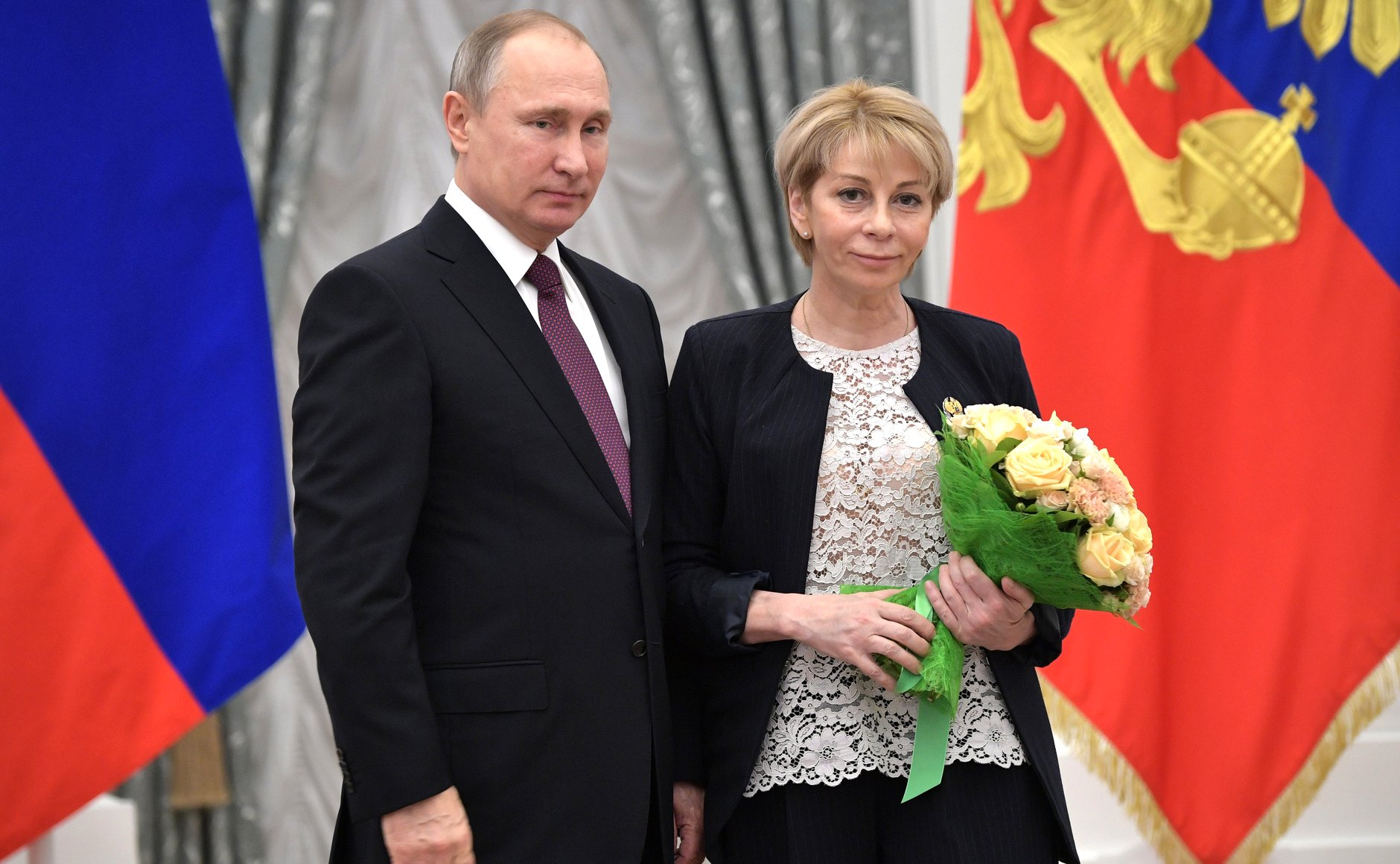 Вручение Государственных премий за выдающиеся достижения в области благотворительной и правозащитной деятельности. Лауреатом Государственной премии в области правозащитной деятельности стала Елизавета Петровна Глинка, исполнительный директор Международной общественной организации «Справедливая помощь».